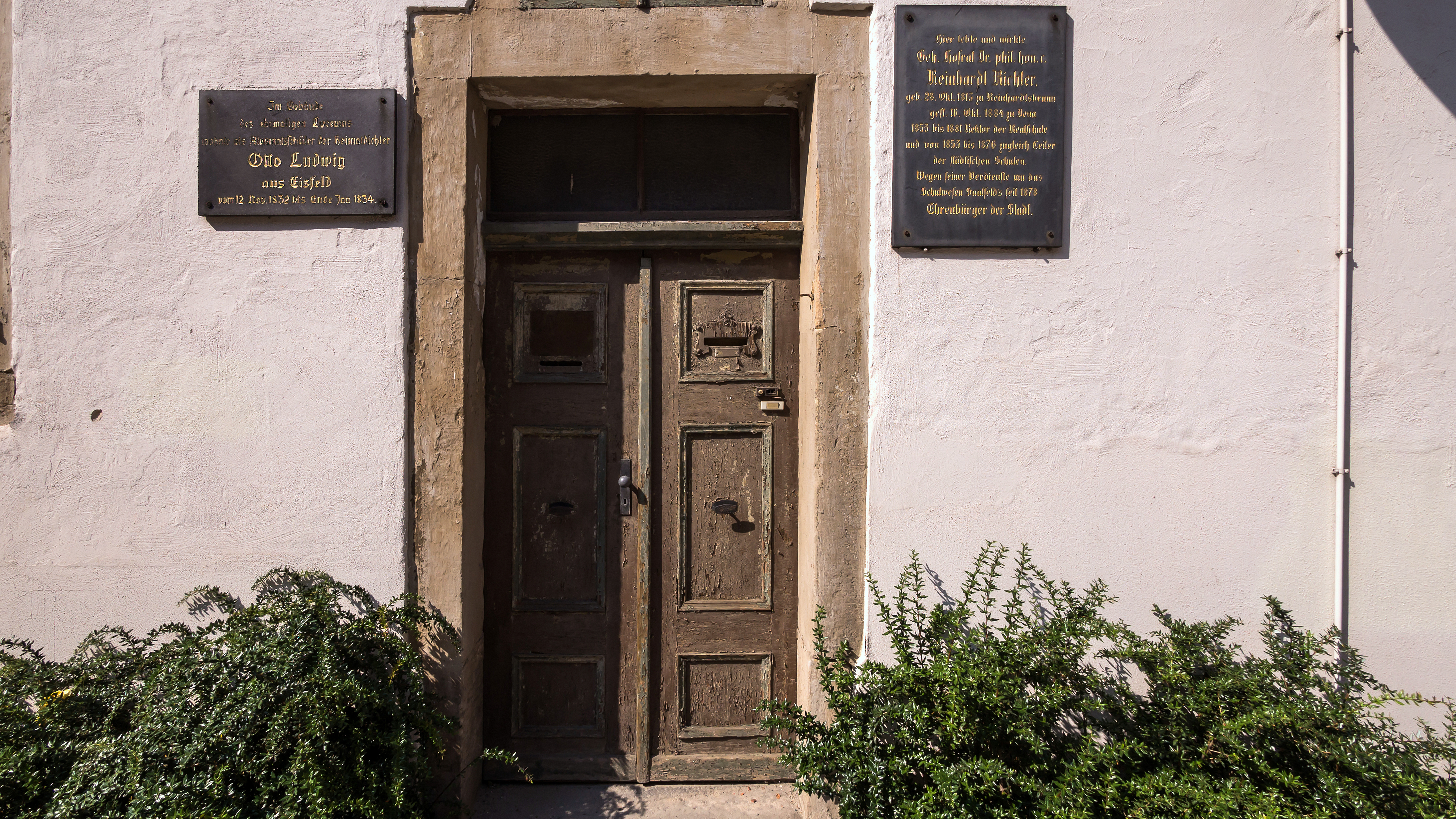 Saalfeld-Saale Brudergasse 22 Wohnhaus mit Gedenktafel für Otto Ludwig und Reinhard Richter Bestandteil Denkmalensemble "Stadtkern Saalfeld-Saale" 2